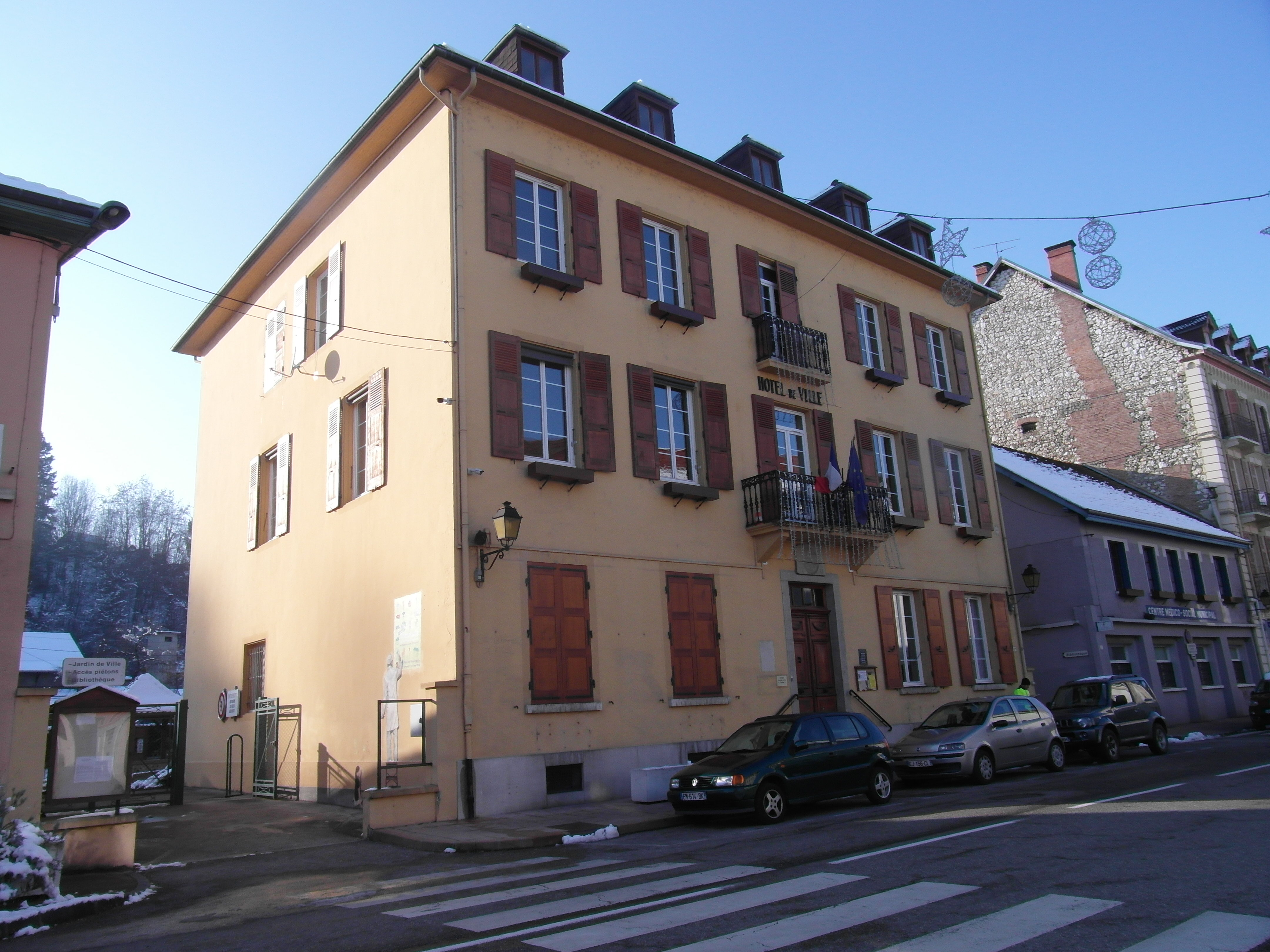 Hôtel de vile de Pont de Beauvoisin (Isère)